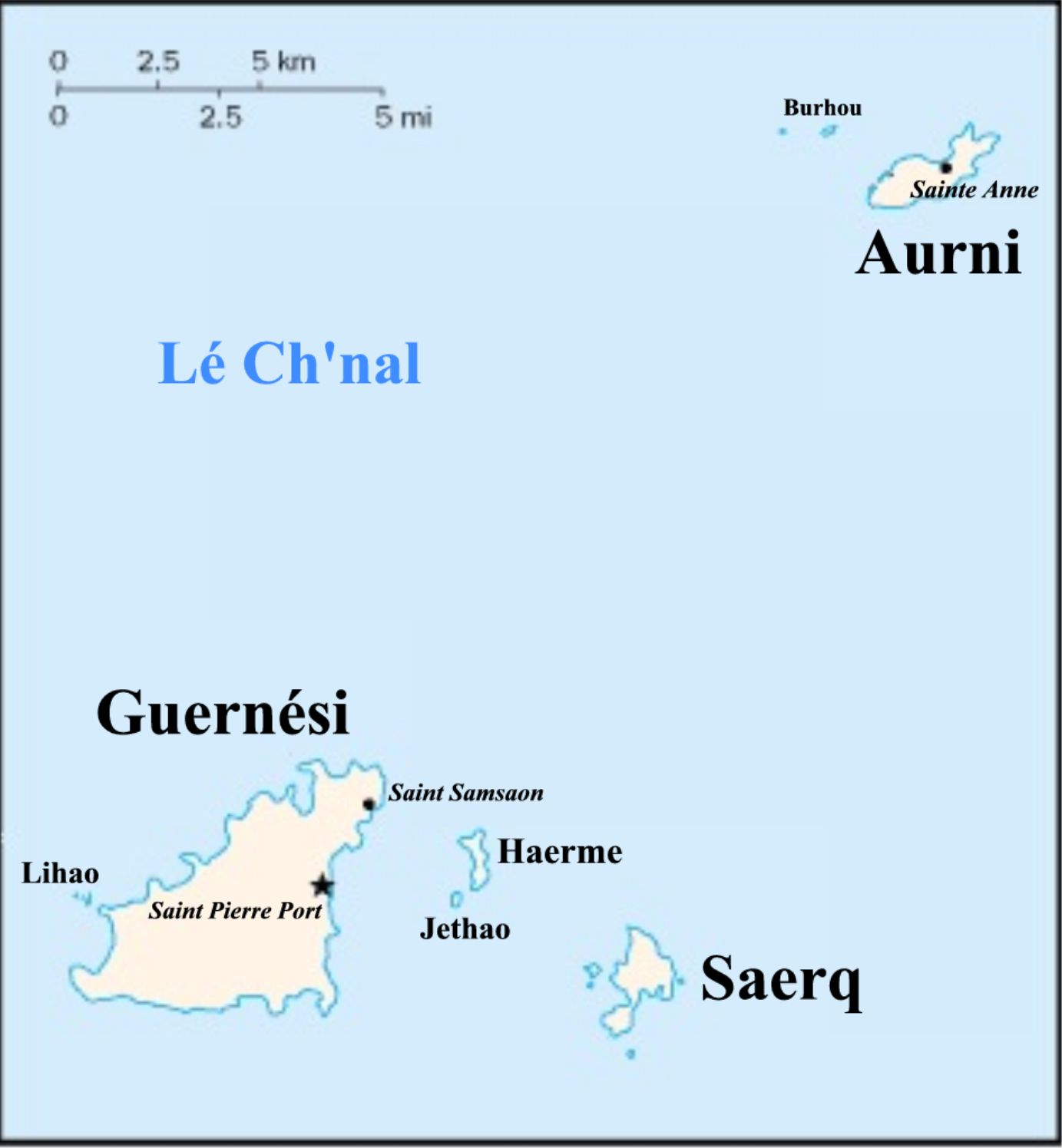 Eune carte du Bailliage dé Dgèrnésy êtitchettée en Dgèrnésiais (pouor la Ouitchipédie Nouormande)Map of Bailiwick of Guernsey labelled in the Guernsey language